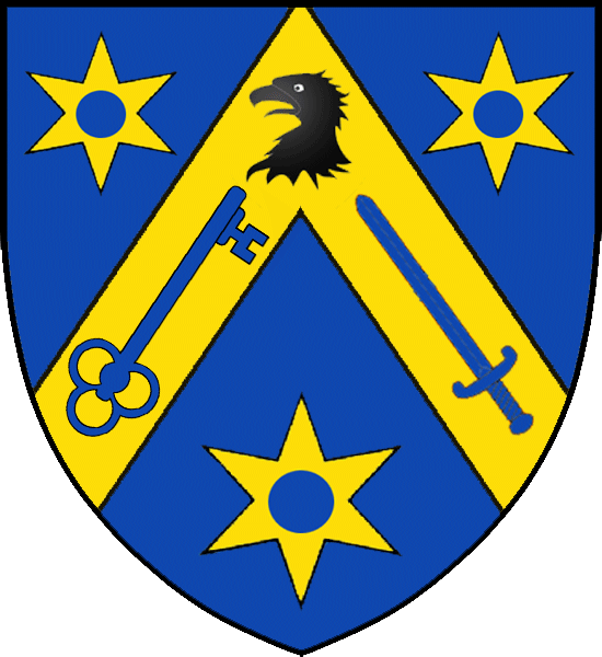 Vapensköld för adelsätten Adlersparre nr 1988